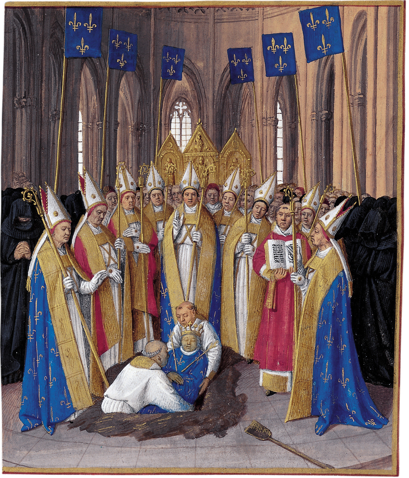 Funérailles de Philippe le Bel Grandes Chroniques de France, enluminées par Jean Fouquet, Tours, vers 1455-1460 Paris, BnF, département des Manuscrits, Français 6465, fol. 323 (Livre de Philippe le Bel) Le 29 novembre 1314, Philippe le Bel meurt à Fontainebleau. Le 3 décembre, il est inhumé dans la basilique de Saint-Denis.